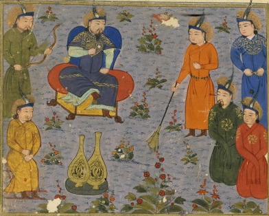 Mengeser Noyan interrogeant les conjurés